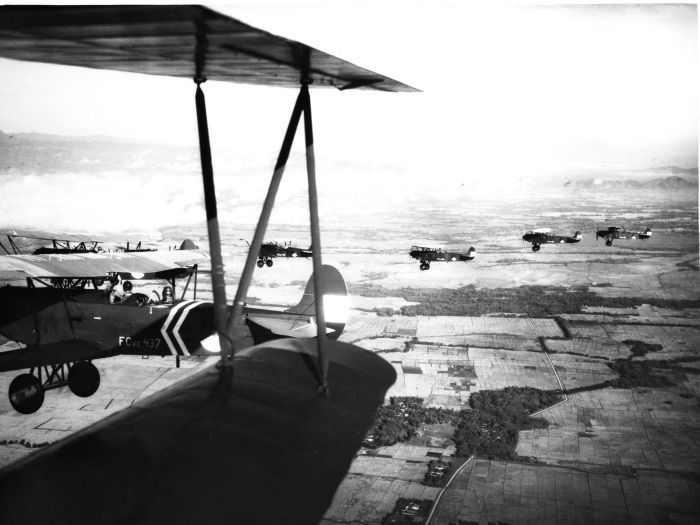 Repronegatief. Een eskader Fokker vliegtuigen van het KNIL in de lucht